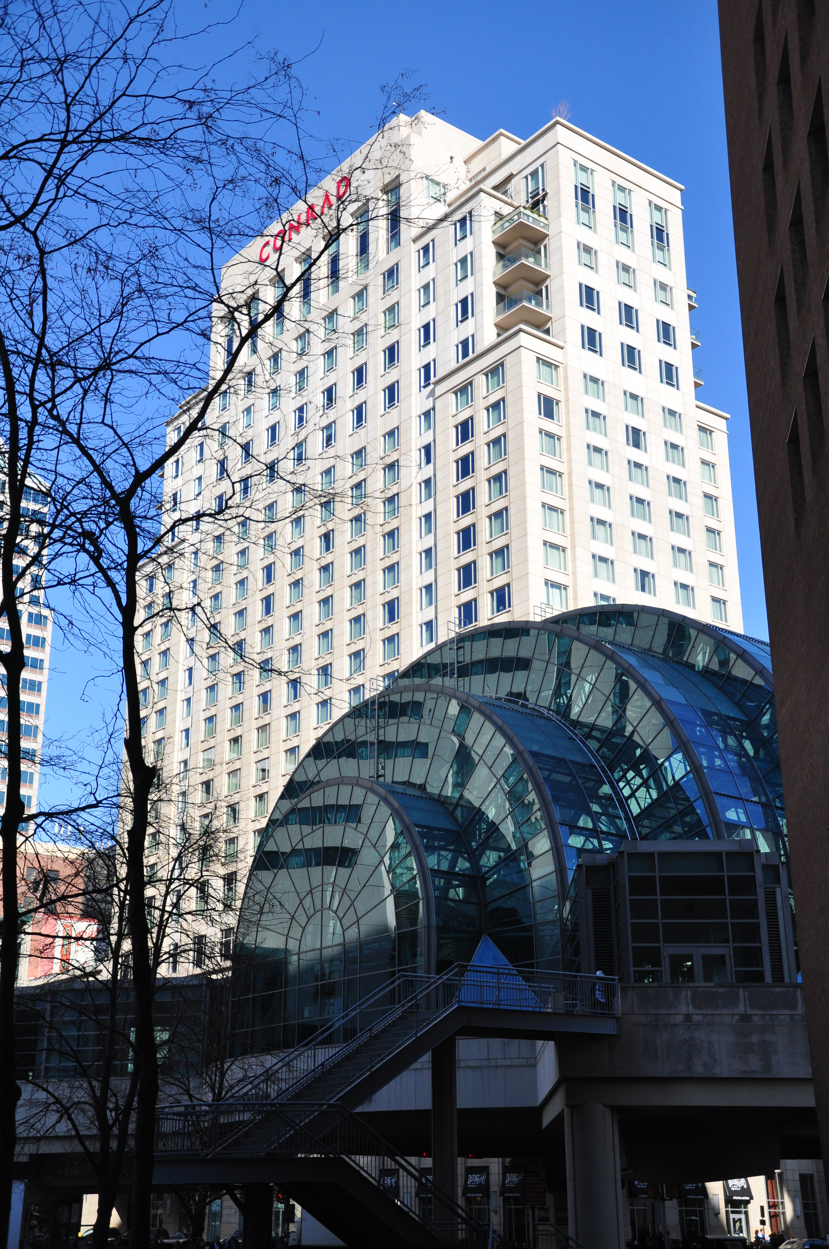 Skywalk